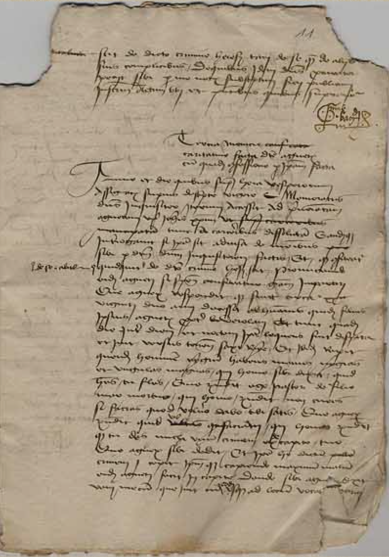 Pages du Procès de sorcellerie d'Agnes Christini rédigés par Guillelmus Bagniodi, notaire, commissaire à Bagnes réunis en Cahier 32 pages (210 x 295 x 5 mm) archivés aux Archives historiques de l'abbaye de Saint Maurice.